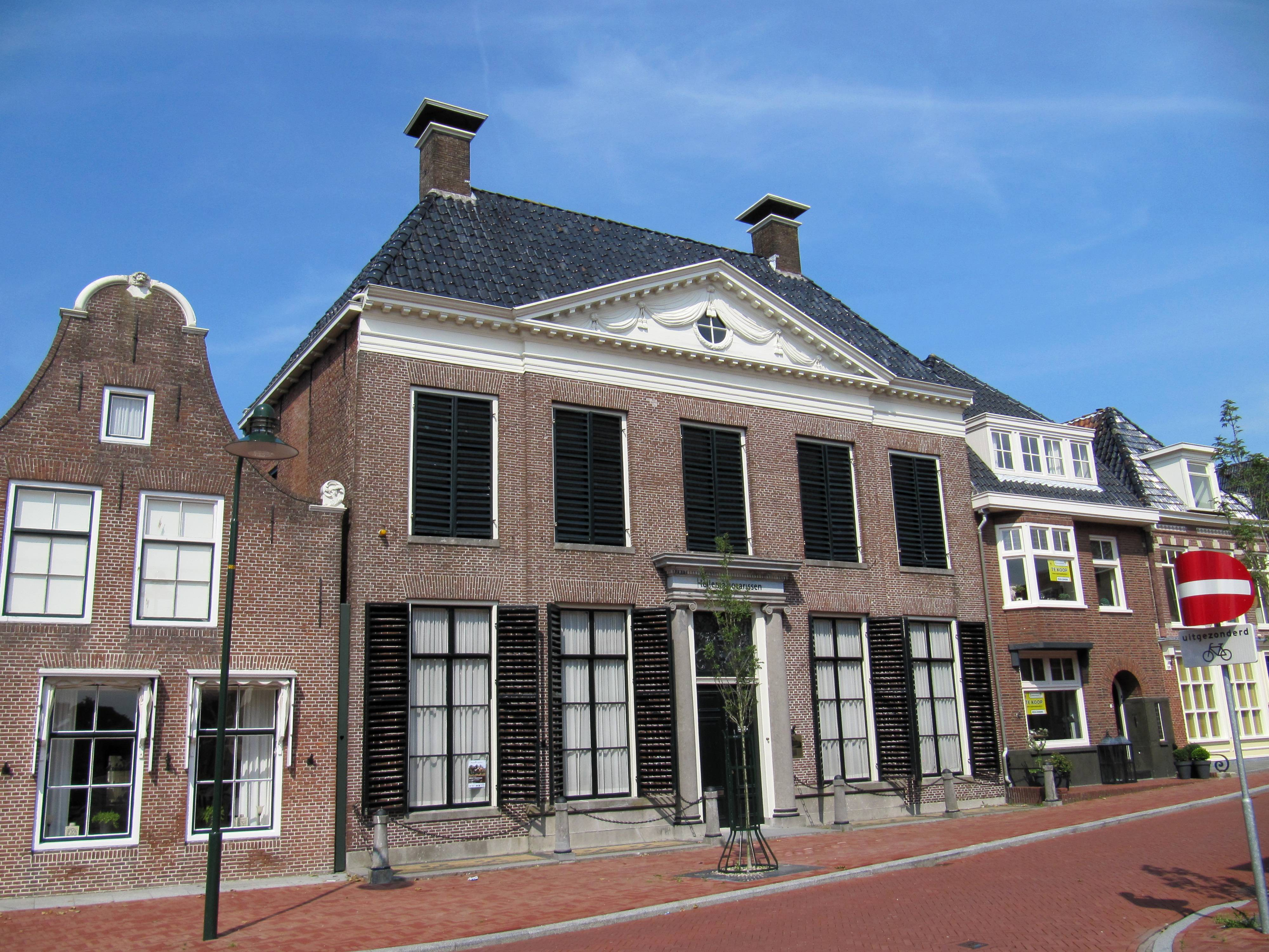 Deftig pand van vijf traveeën onder schilddak met hoekschoorstenen. De drie middelste traveeen als risaliet behandeld en bekroond door tympaan met snijwerk. Door halfzuilen omlijste ingang. Zes stoeppalen door kettingen verbonden.